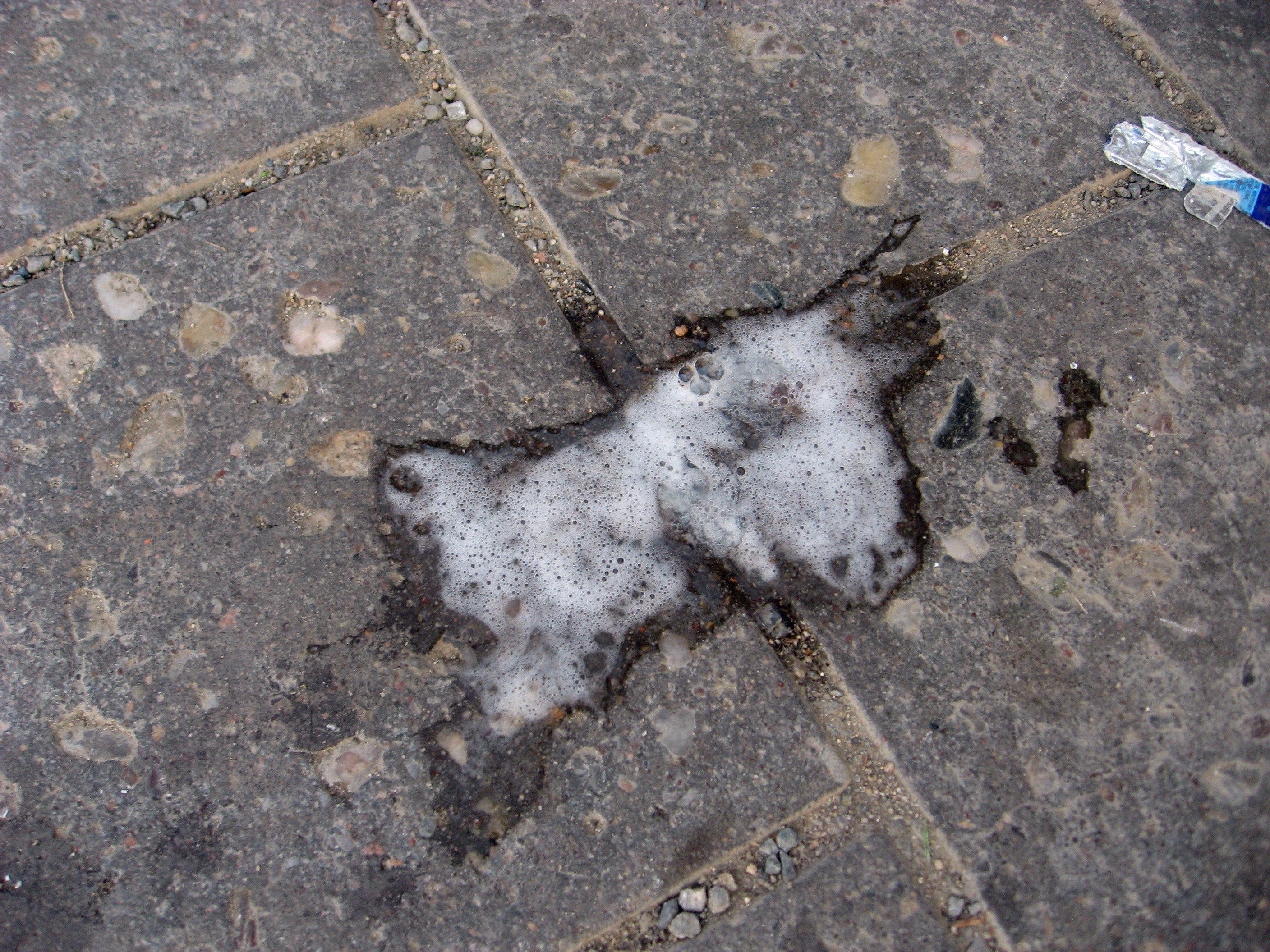 Velký plivanec